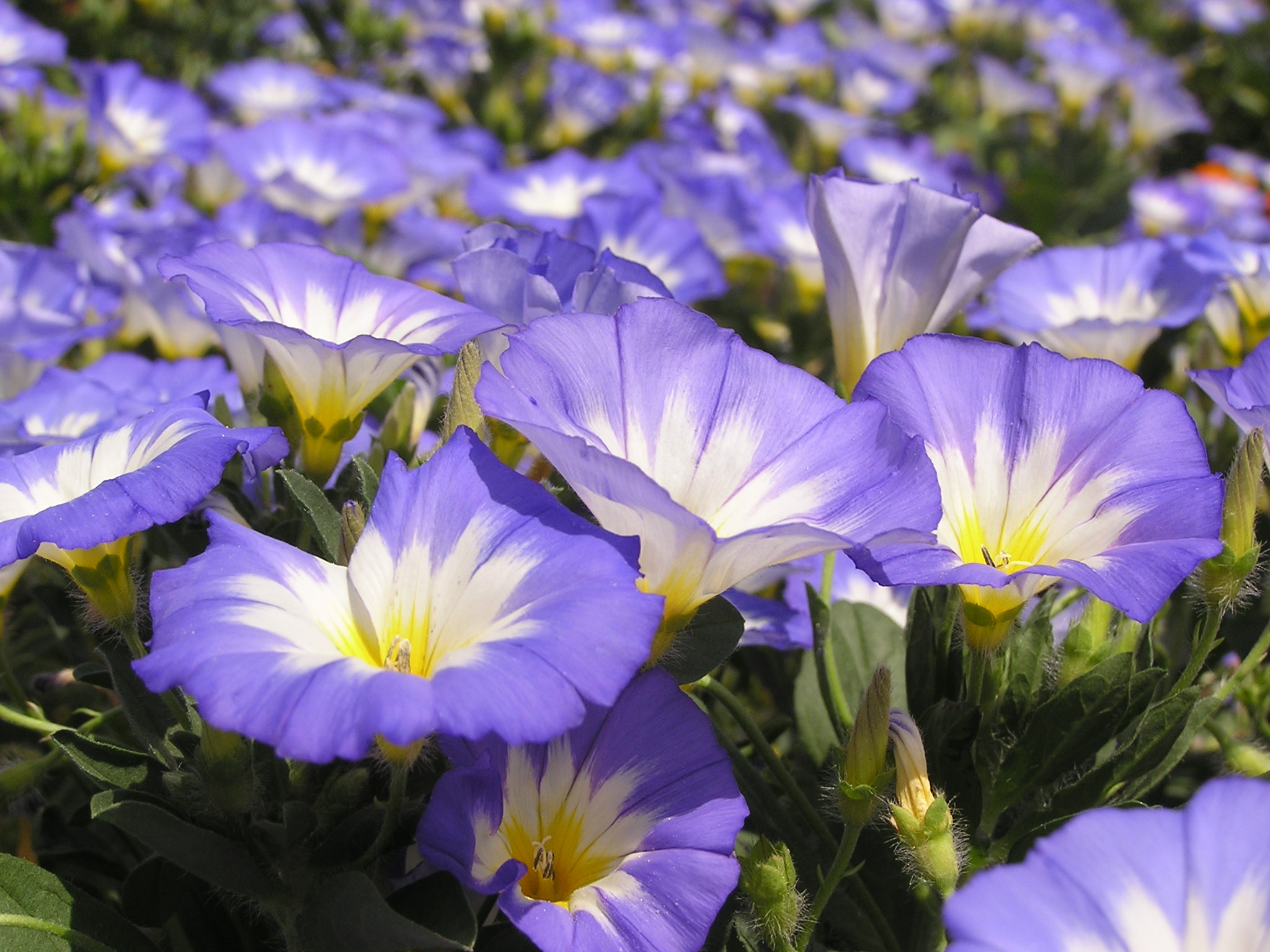 Растение в Седово.